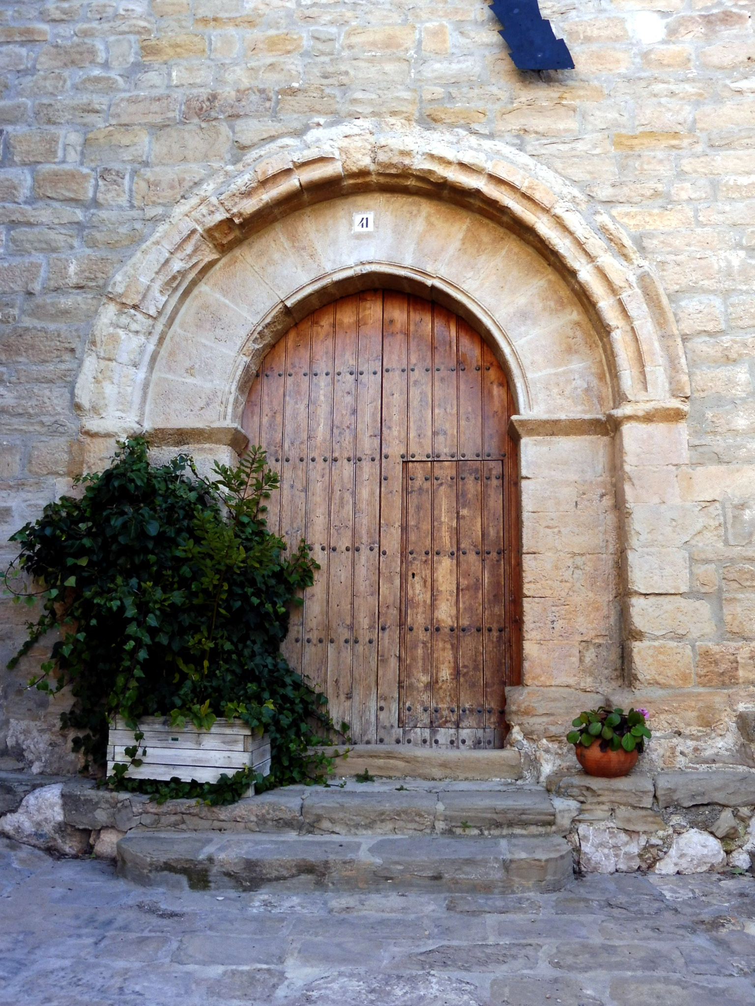 Església parroquial de Sant Miquel de Fontllonga (Camarasa): portada